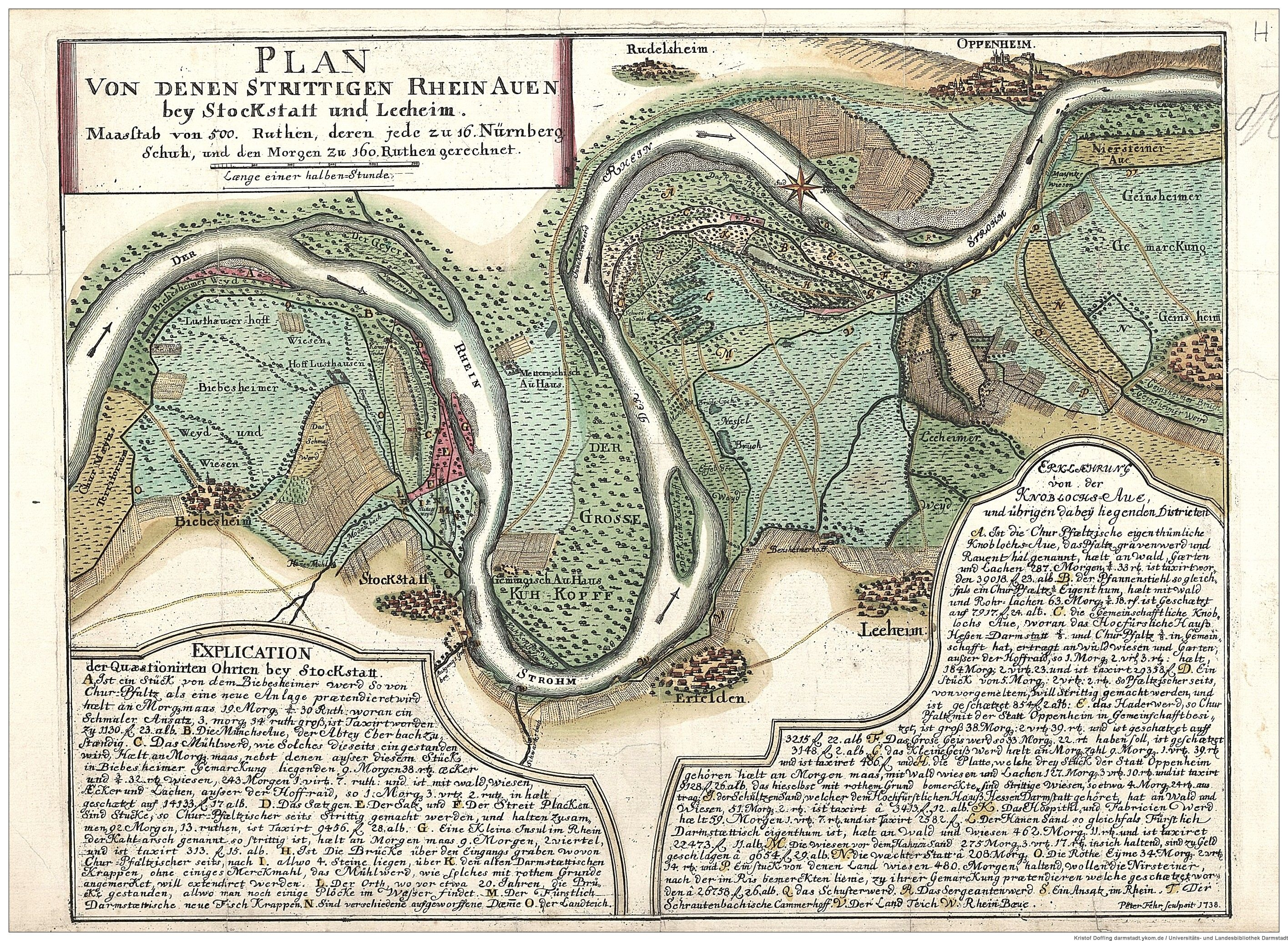 Karte der Rheinauen zwischen Biebesheim und Geinsheim von 1738.